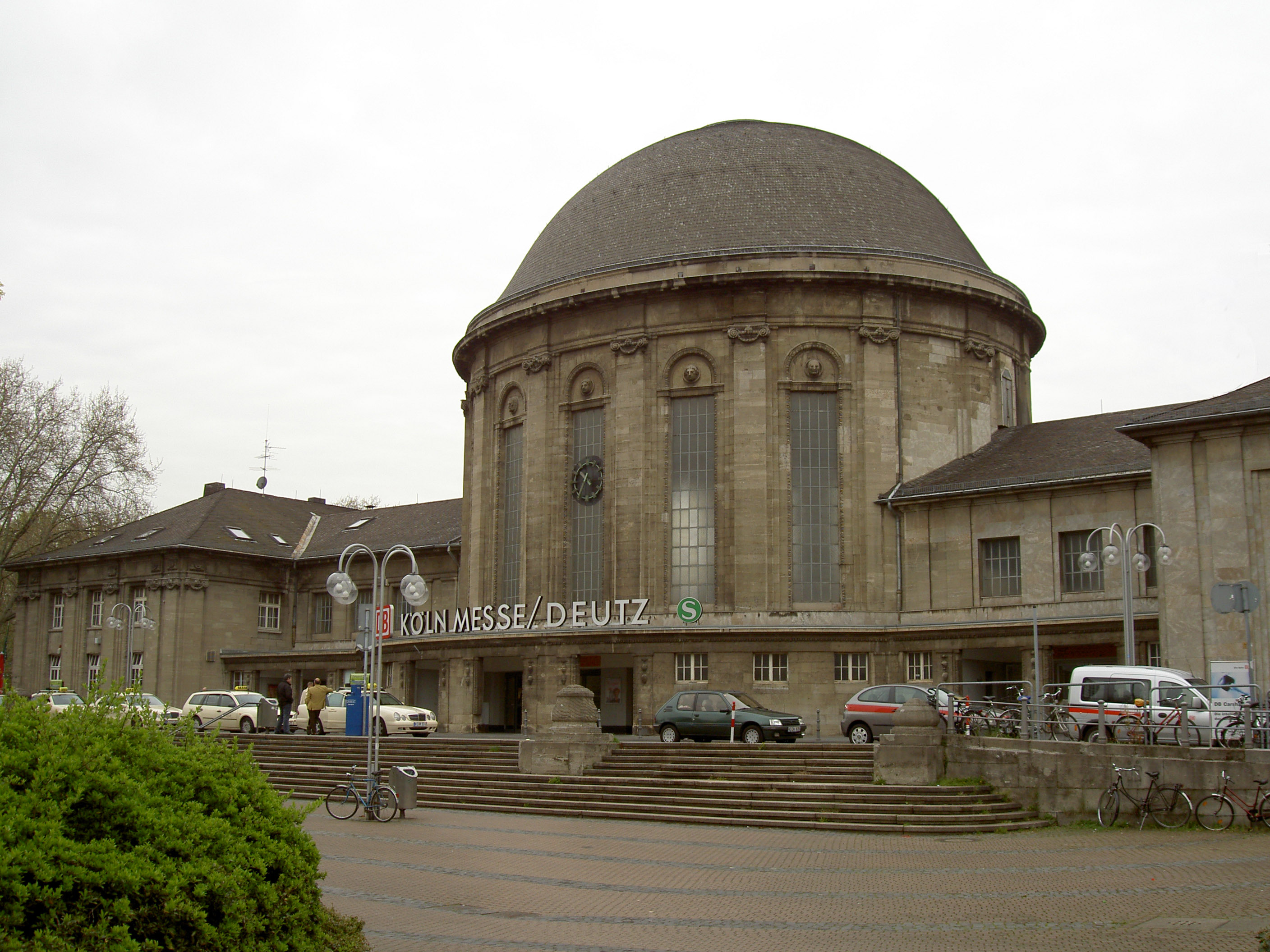 Germany Cologne Deutz Train Station Messe Deutz